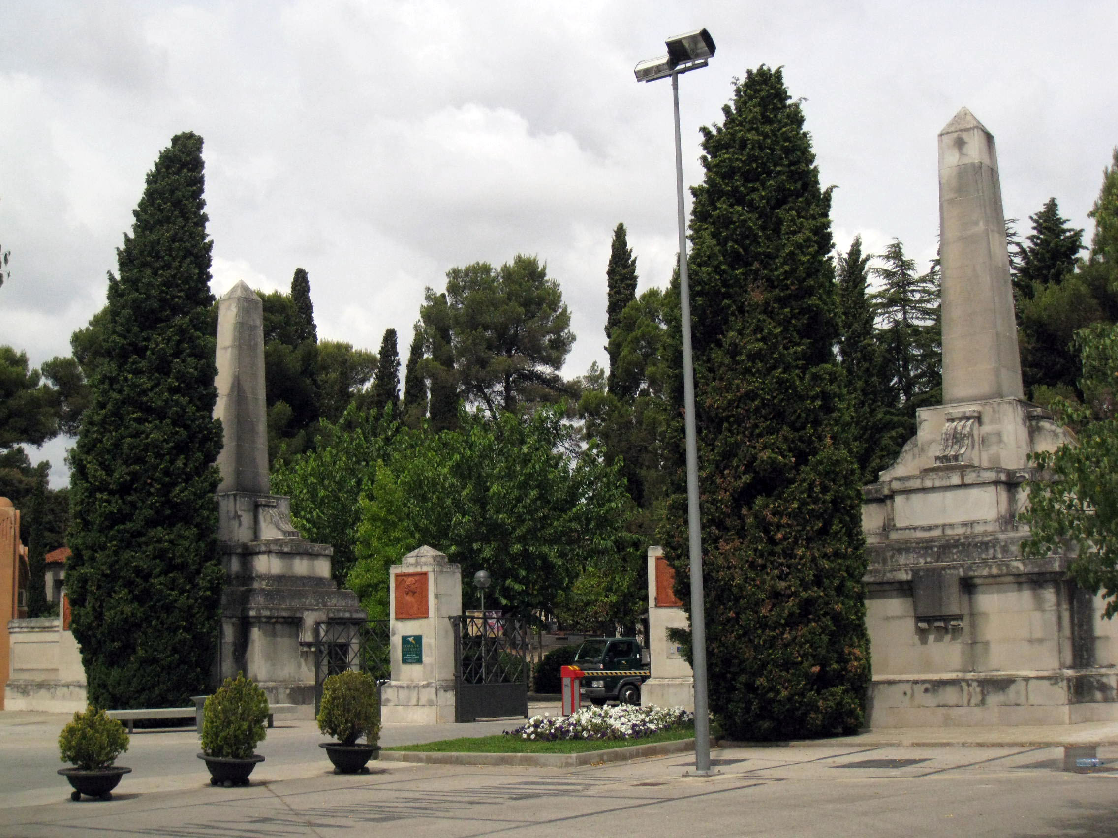 Cementiri Nou de Terrassa, obra de Melcior Viñals (1930). Vista de l'entrada.